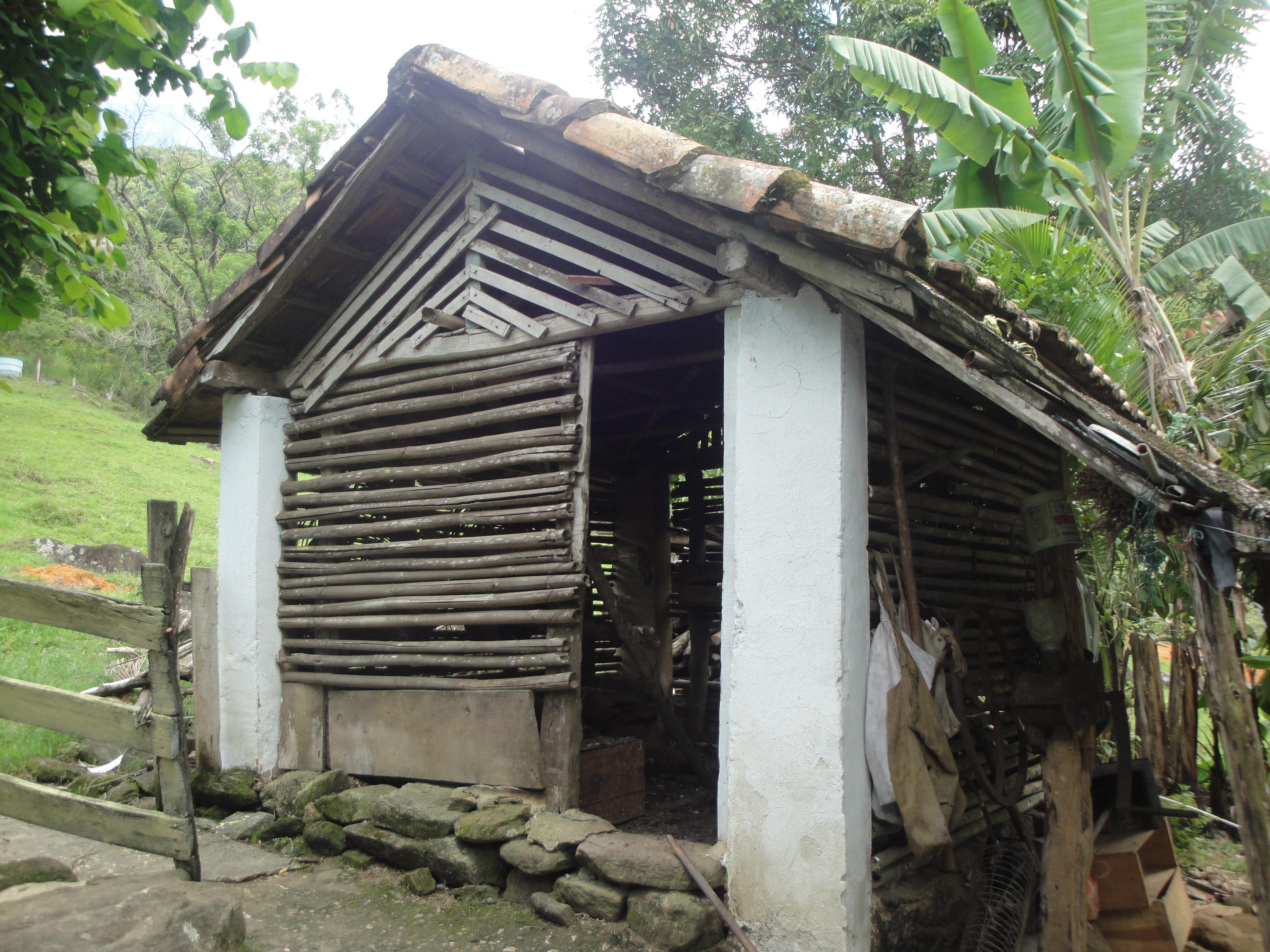 Um galinheiro em Cachoeiras de Macacu.